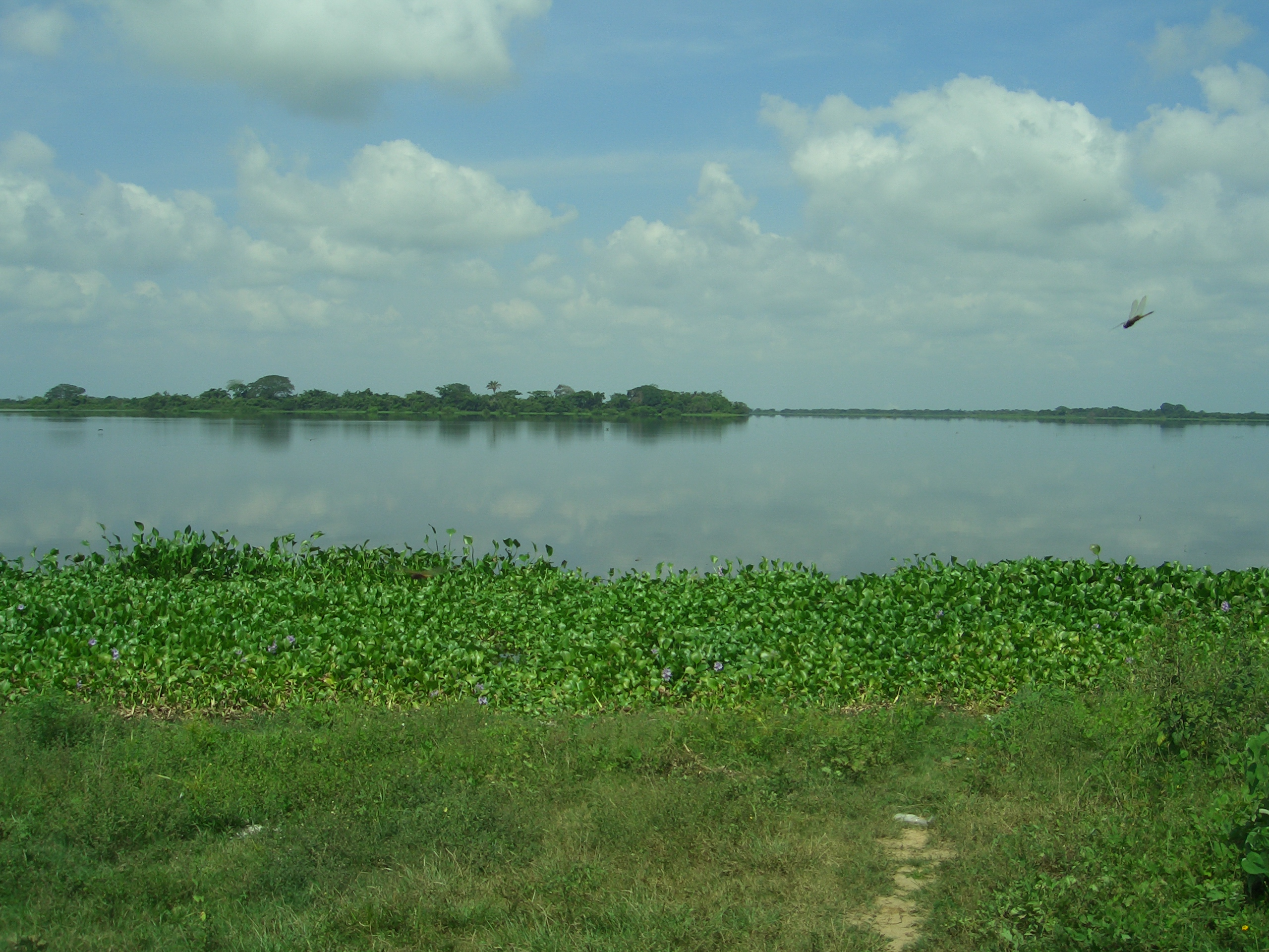 Laguna El Plan (antes San Bartolo y Chimala) en el Carlos A. Carrillo, Ver.